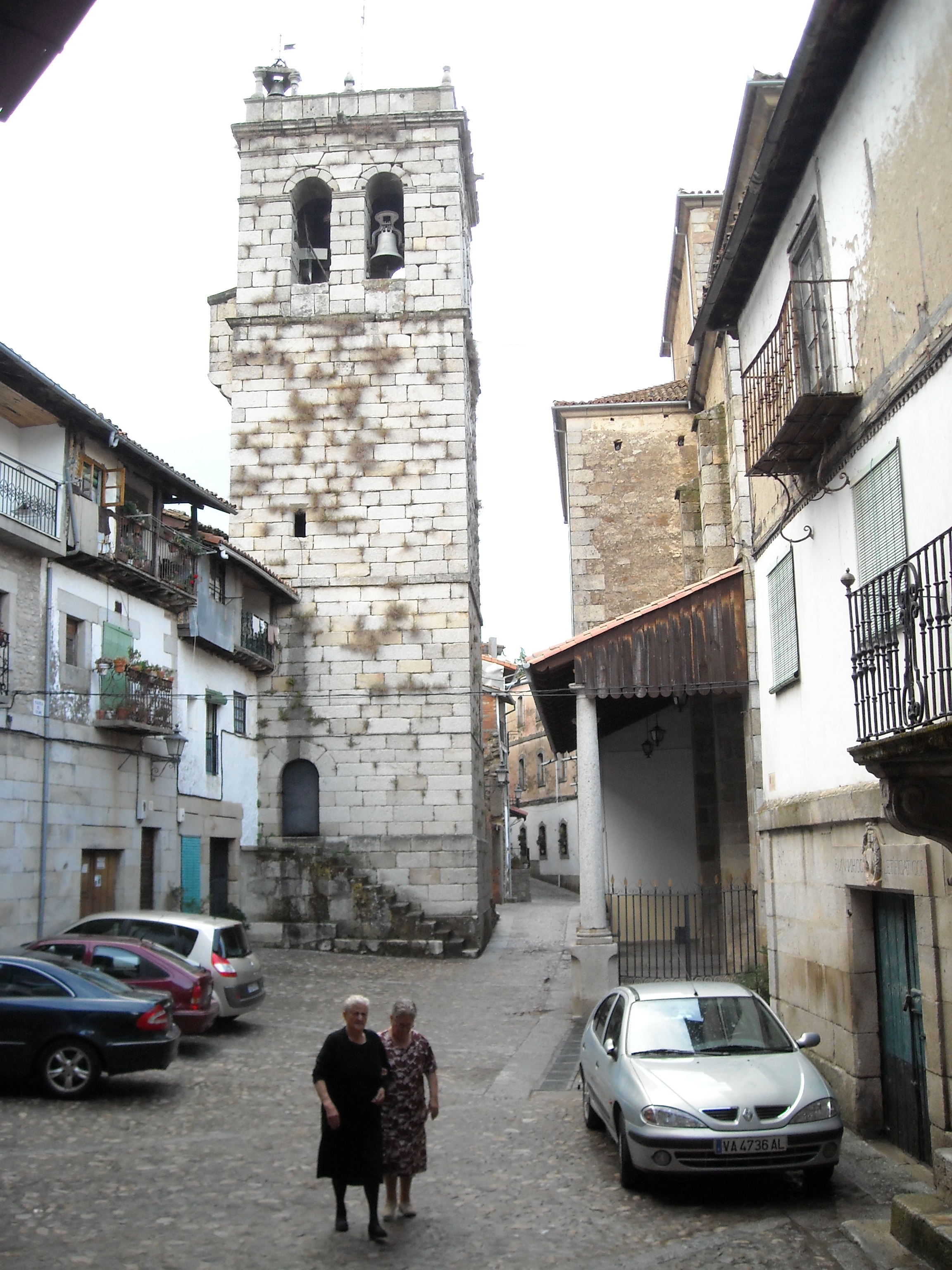 Iglesia de Nuestra Señora de las Nieves, Mogarraz, Salamanca, España